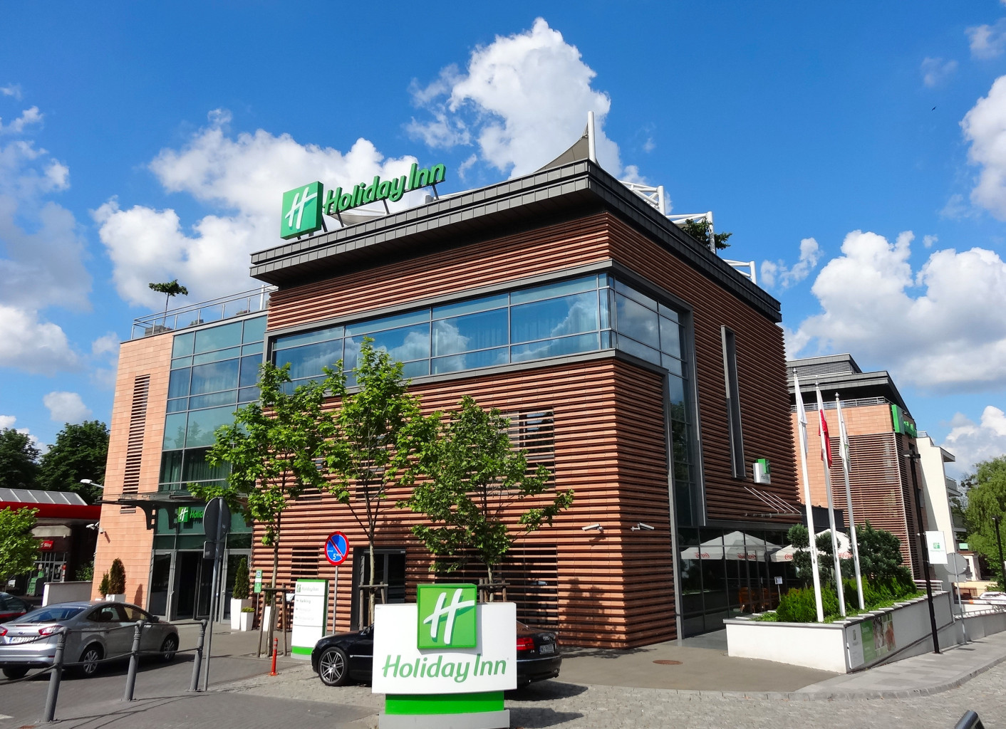 Hotel Holliday Inn w Bydgoszczy przy ul. Grodzkiej (zbud. 2010 r.)